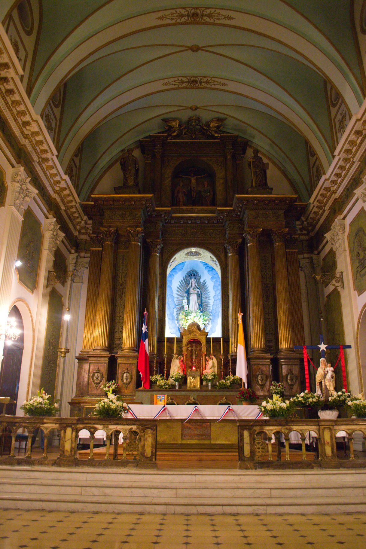 Altar mayor de la Basílica Corazón de María This is a photo of a national monument in Chile: 869